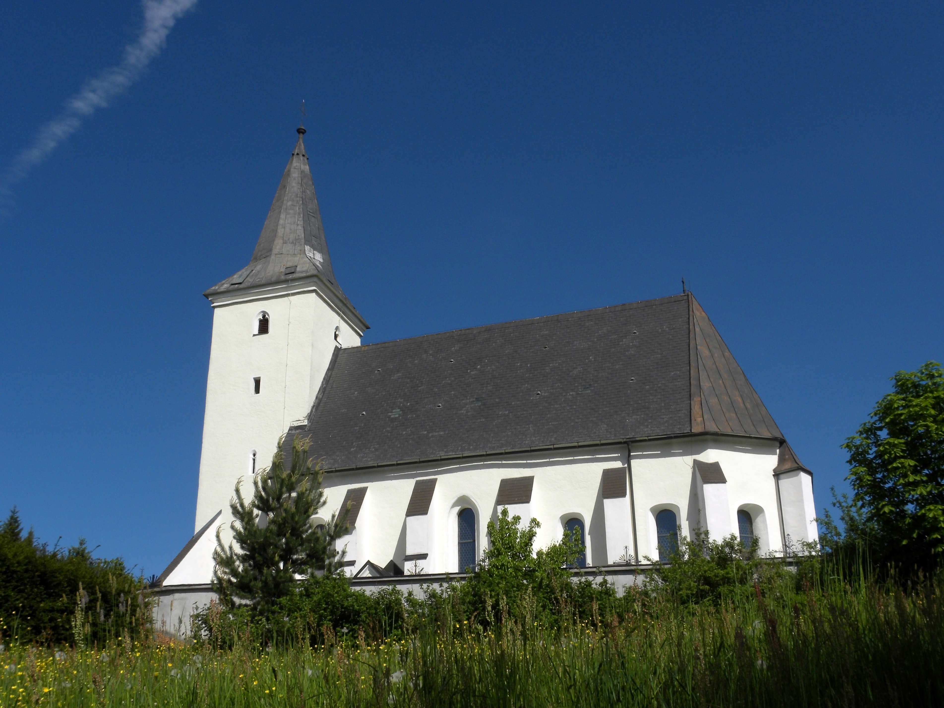 Die Pfarrkirche Sankt Nikolaus in Windhag